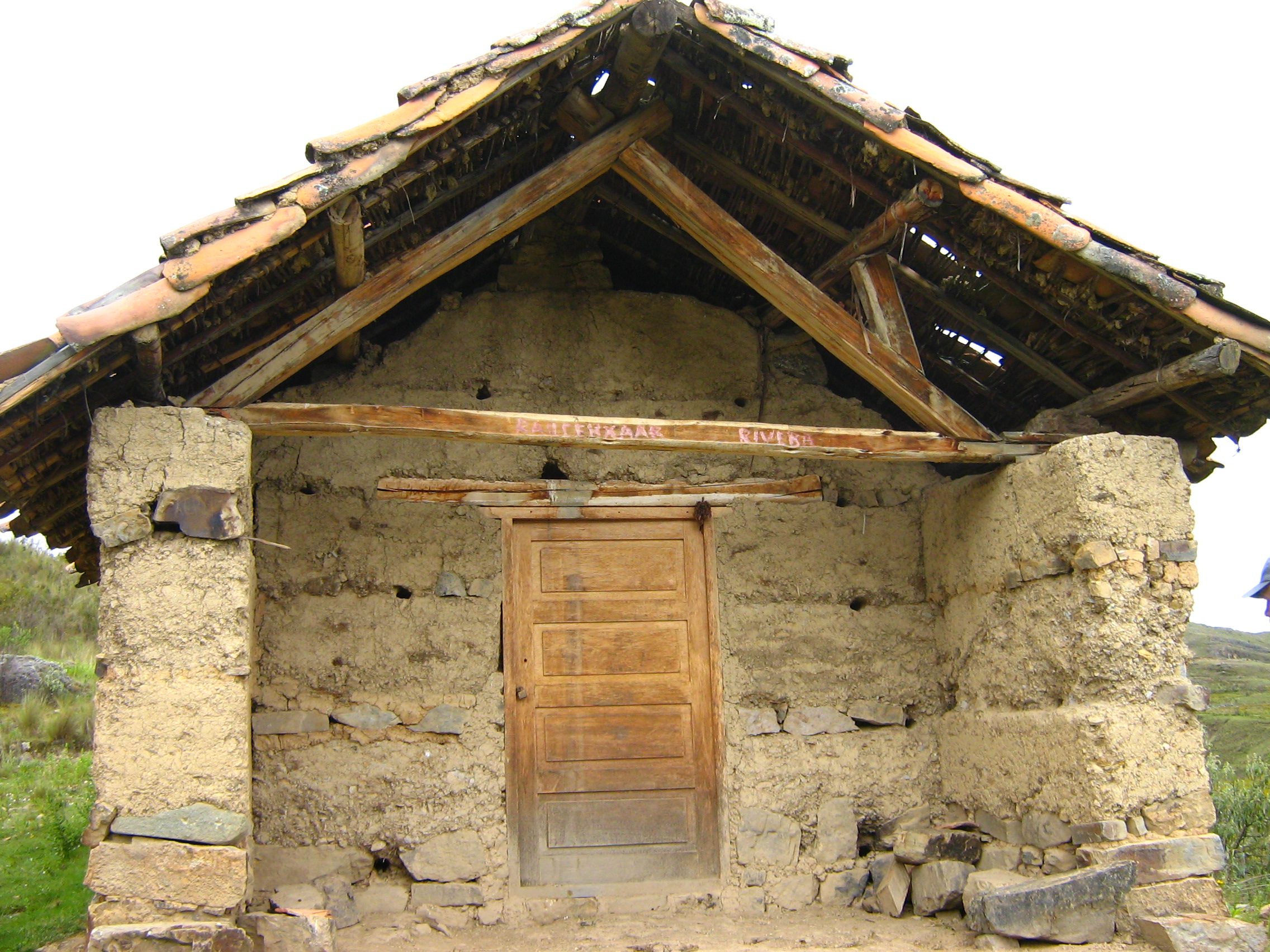 Oratorio de Qellaycuhuana. Posible rincón de viejos orfebres preíncas